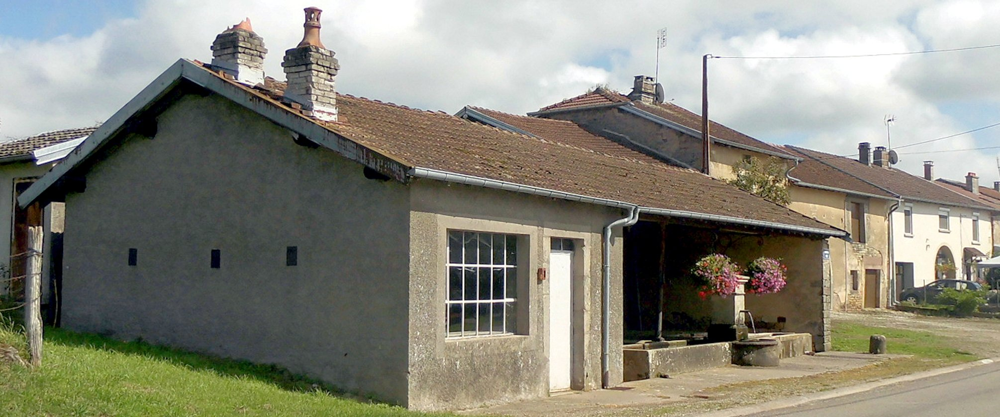 Le lavoir de Pont-du-Bois